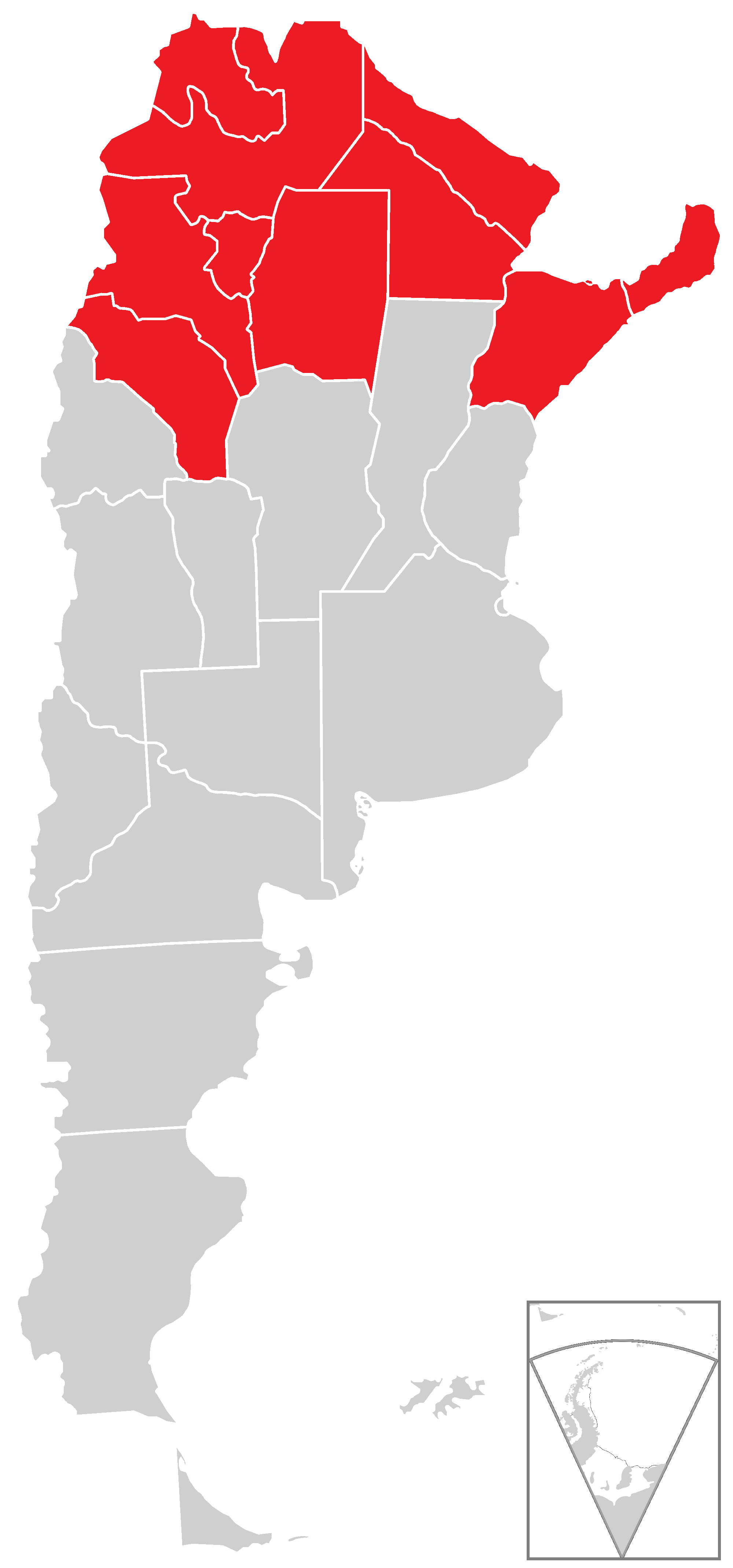 Mapa de las provincias abarcadas por la Unidad Plan Belgrano, creado el 10 de diciembre de 2015